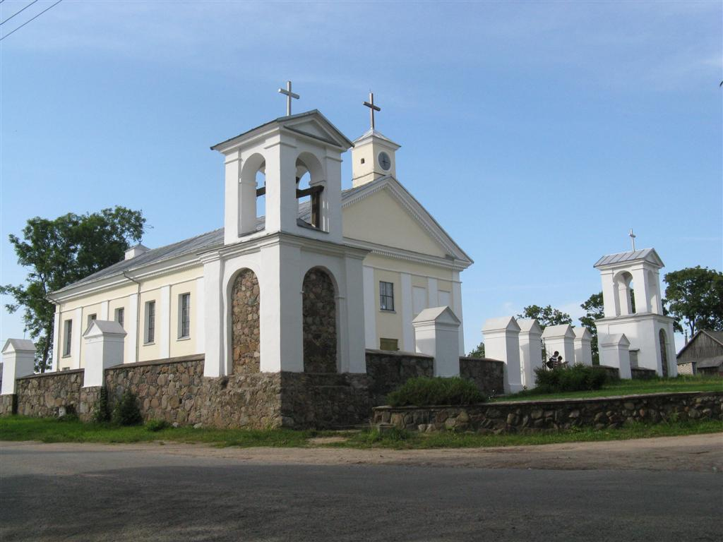 Aleksandravėlės Šv. Pranciškaus Serafiškojo bažnyčia